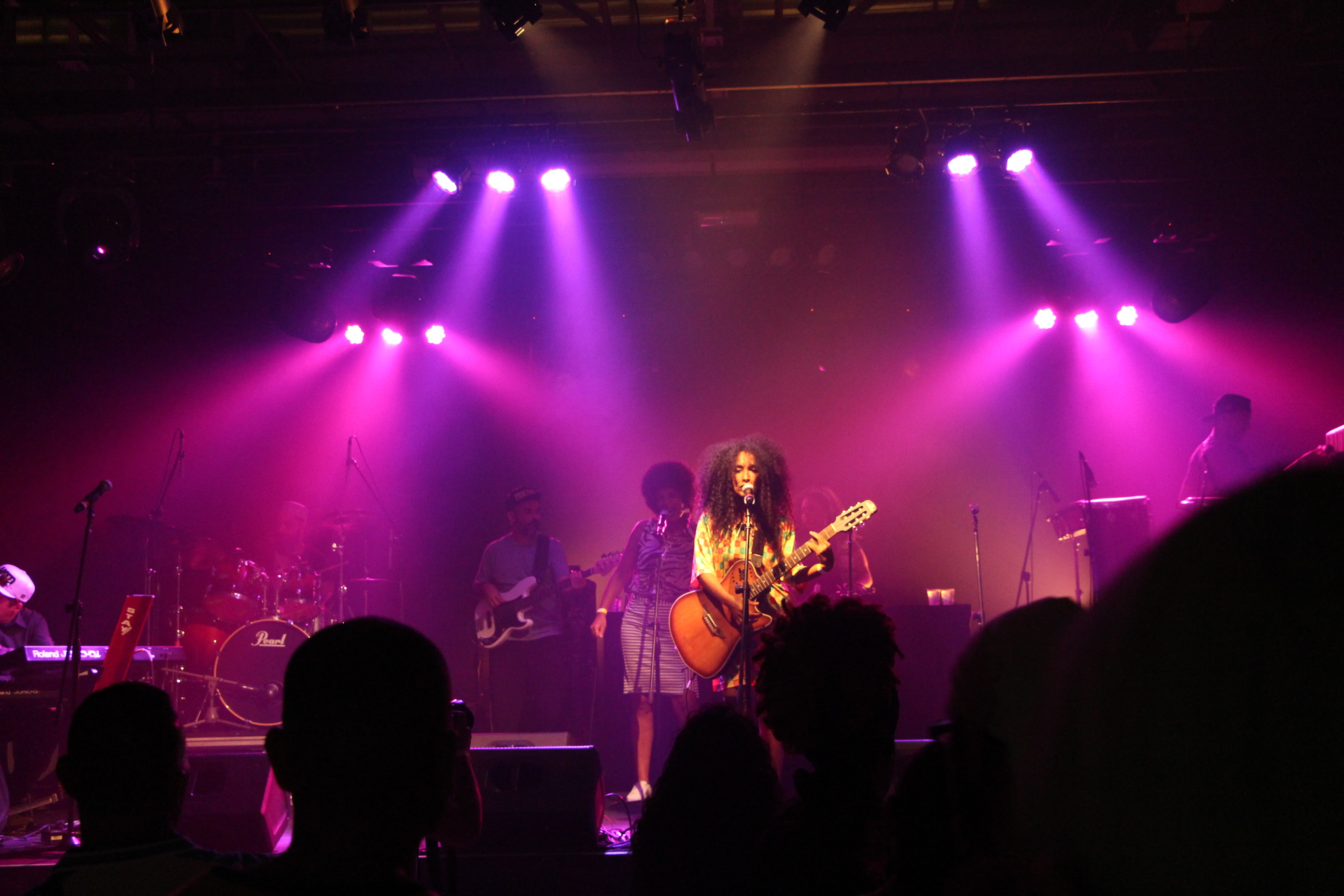 Yzalú se apresentando no SESC SP em 2017